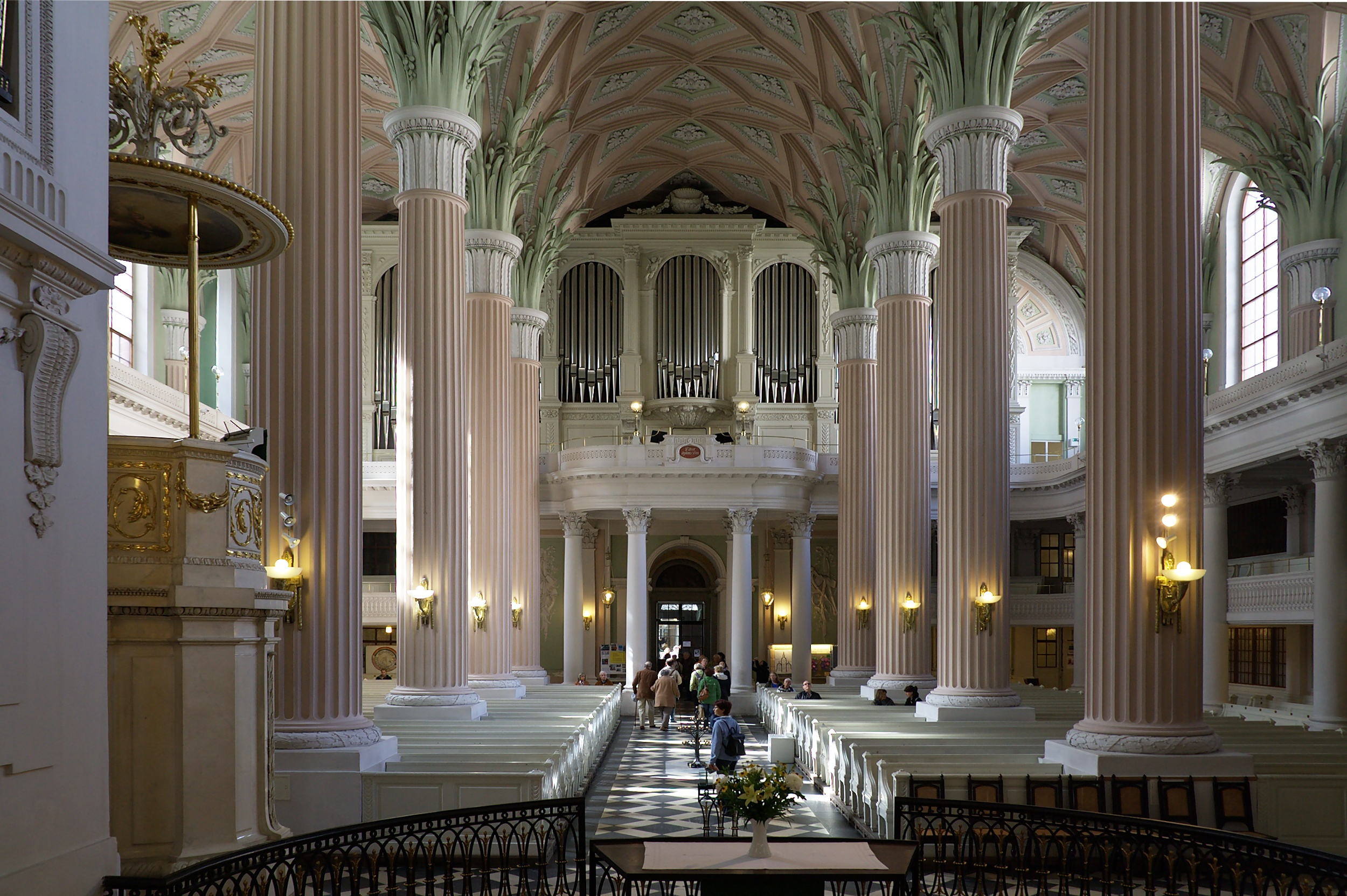 Orgel der Nikolaikirche in Leipzig.